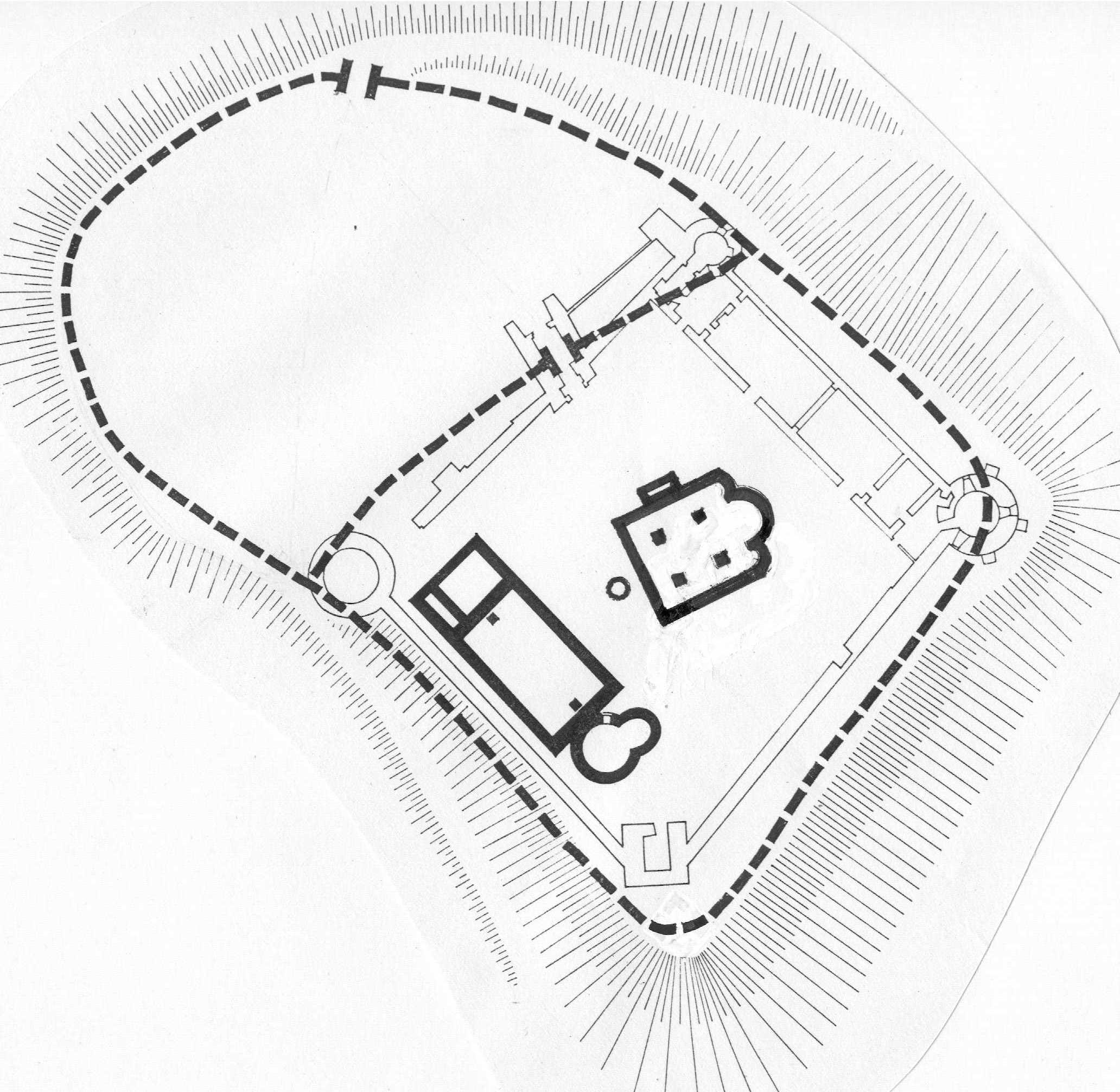 Реконструкція розпланування княжого дитинця в Перемишля в середині ХІІ ст.